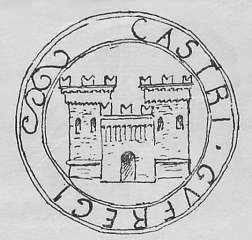 Castel Goffredo, antico sigillo comunale.